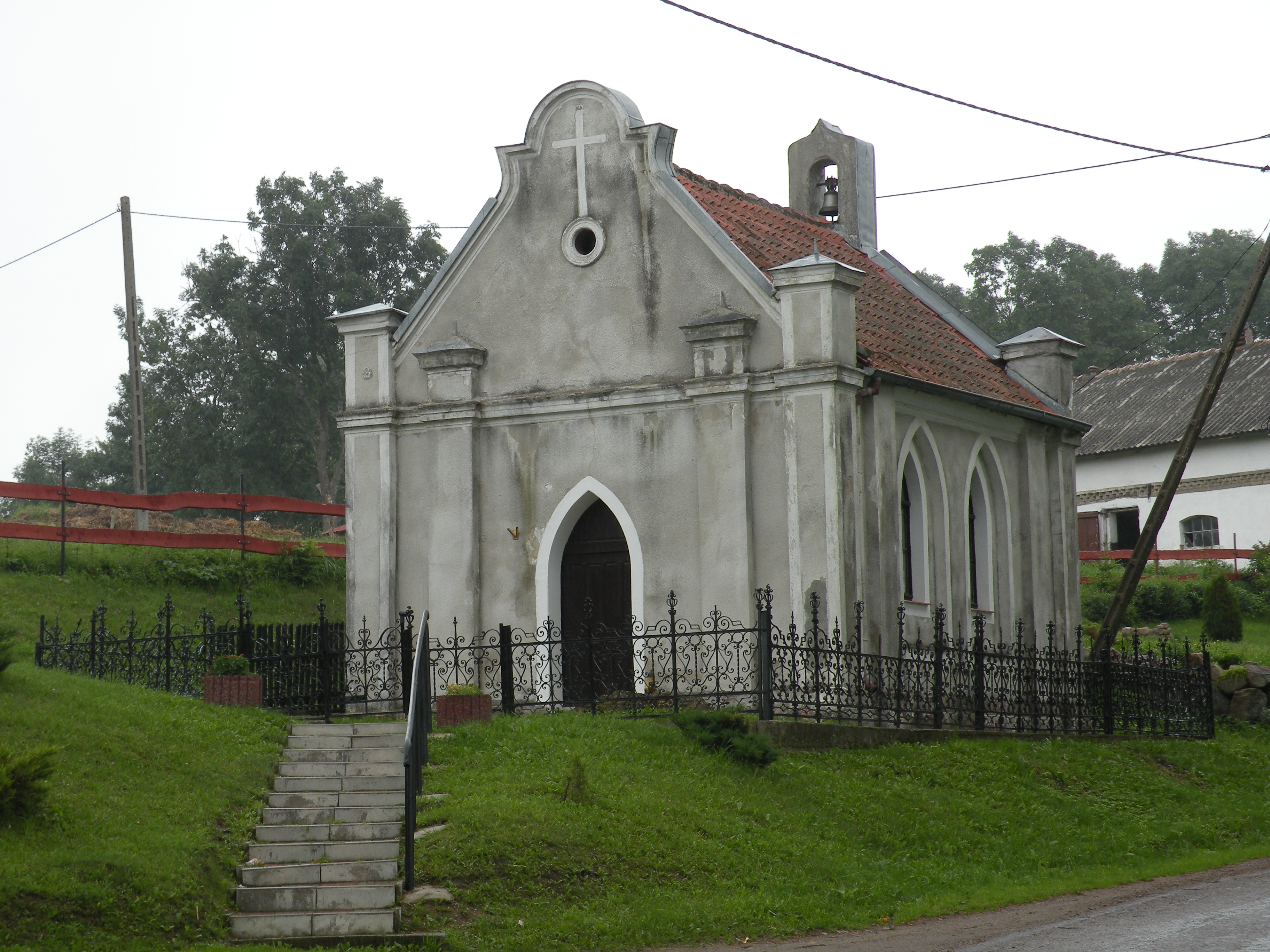 Kabiny - rzymskokatolicka kaplica filialna p.w. Matki Boskiej Różańcowej, 1893